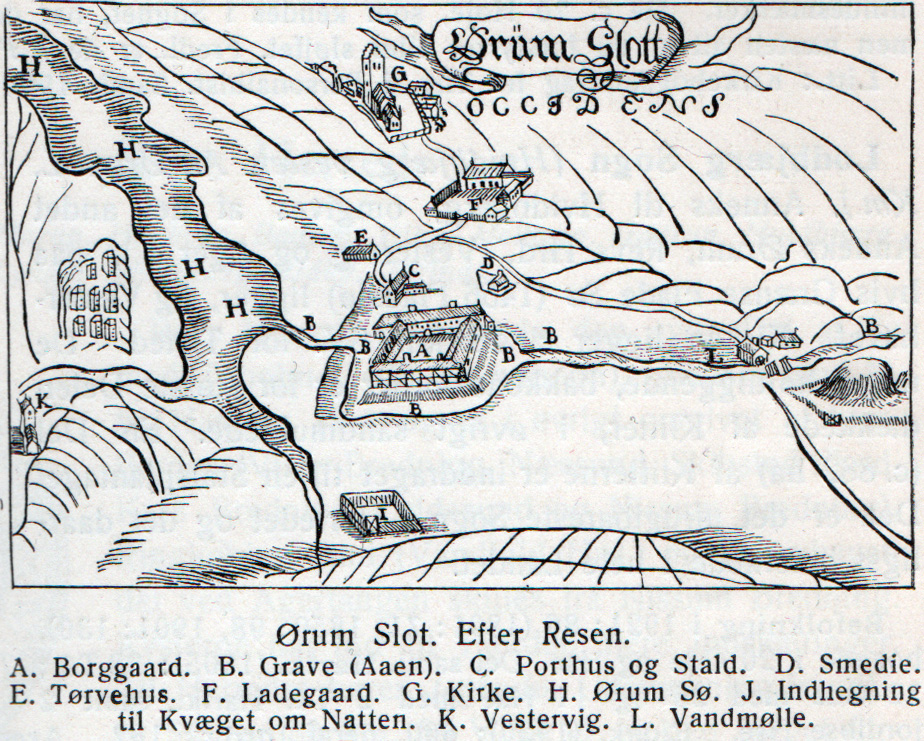 Ørum Slot var en borg, nu et voldsted, ved Hvidbjerg Å ca 400 meter nordøst for Ørum Sø i Ørum Sogn Hassing Herred i Sydthy, nu i Thisted Kommune